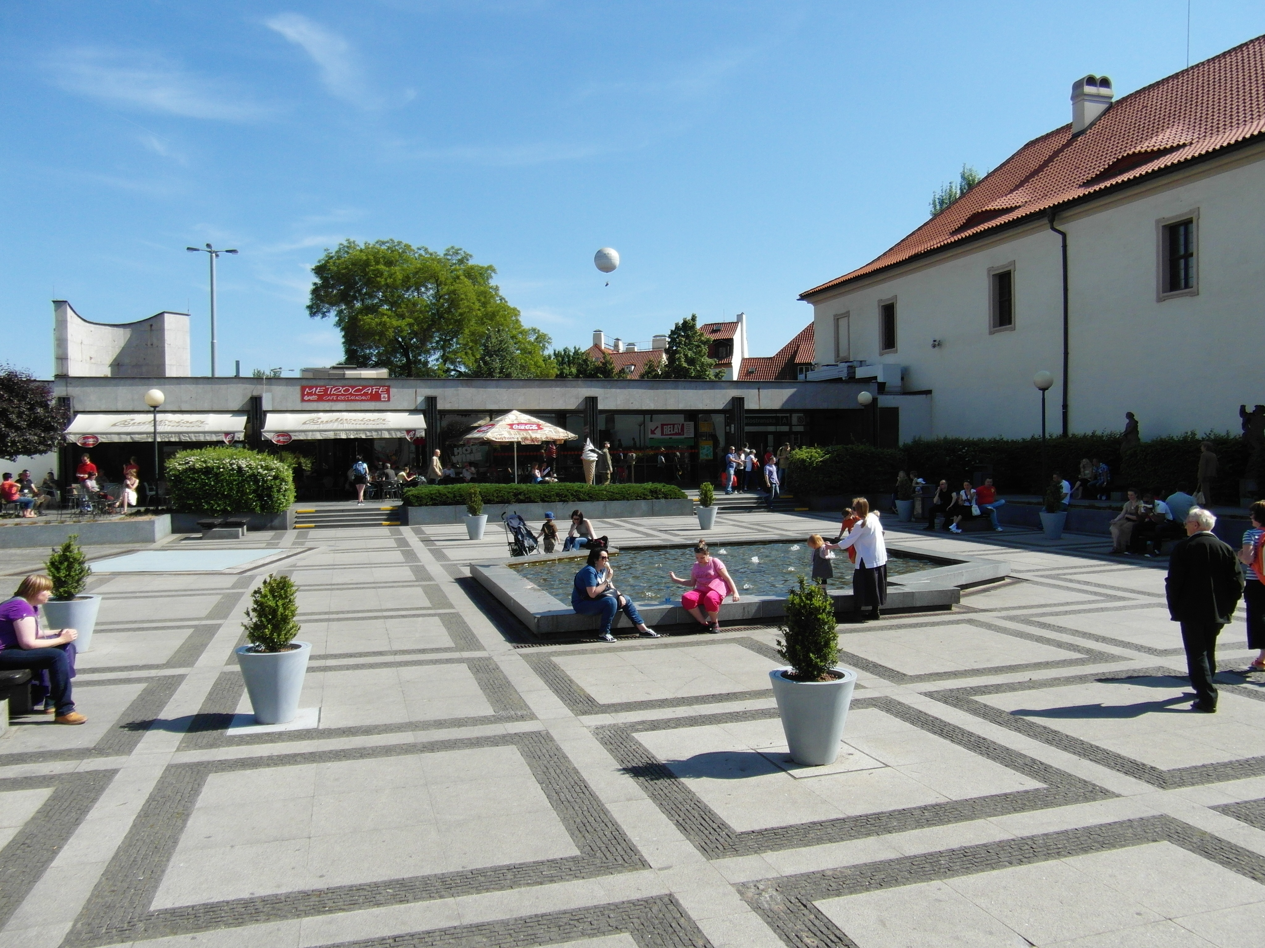 Praha - Metro - Malostranská